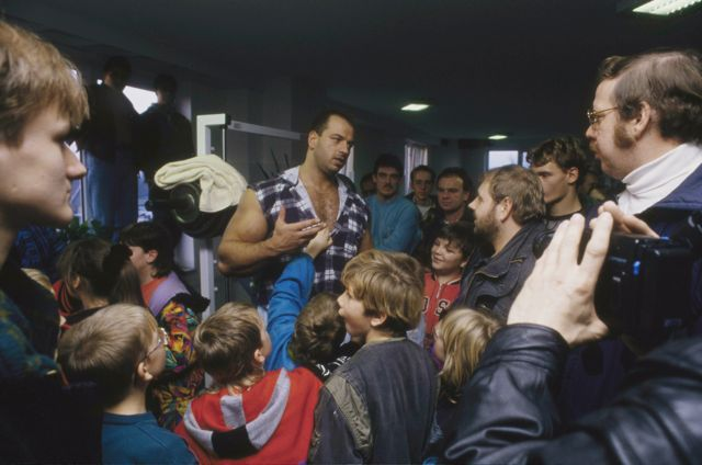 Manfred Höberl, Bodybuilder, 1995 bei einem Auftritt in einem Fitnessstudio in Mülheim an der Ruhr (Nordrhein-Westfalen)